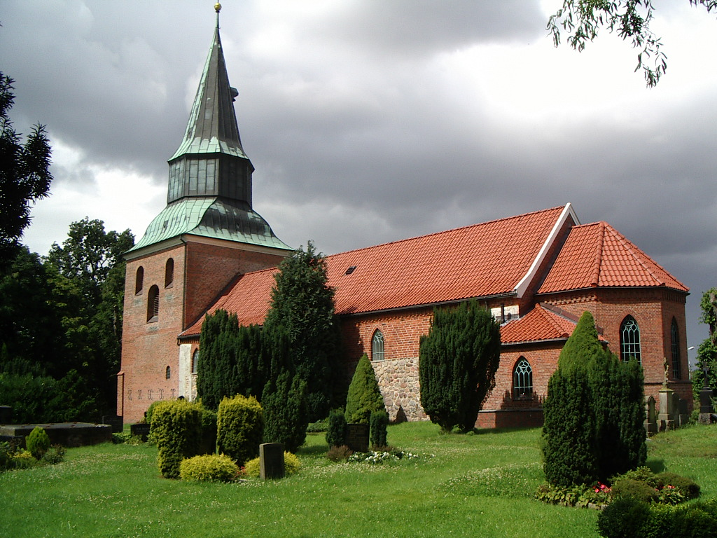 Groden, Kirche St. Abundus Foto von Benutzer:Geoz 2005